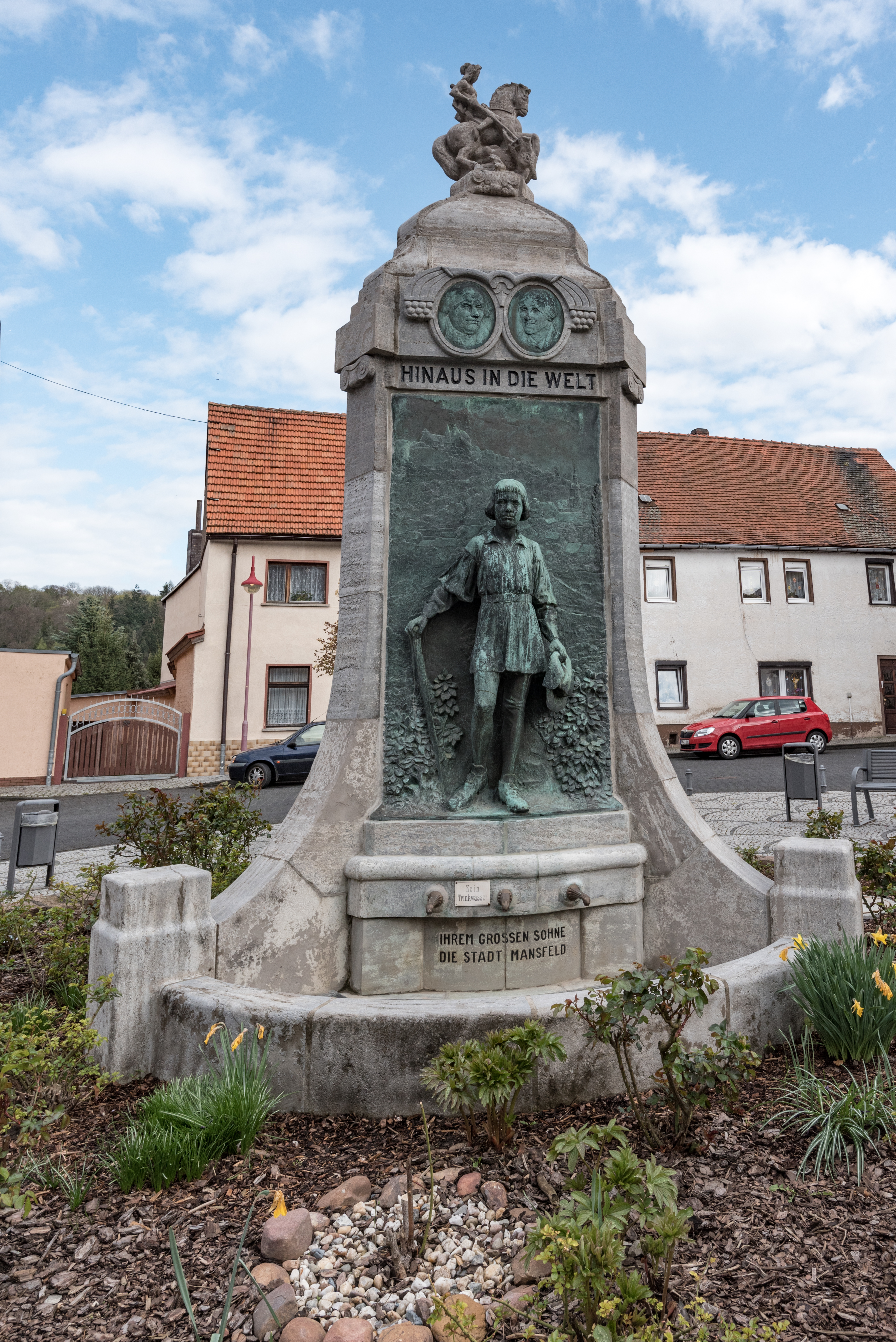 Mansfeld, Lutherplatz, Denkmal